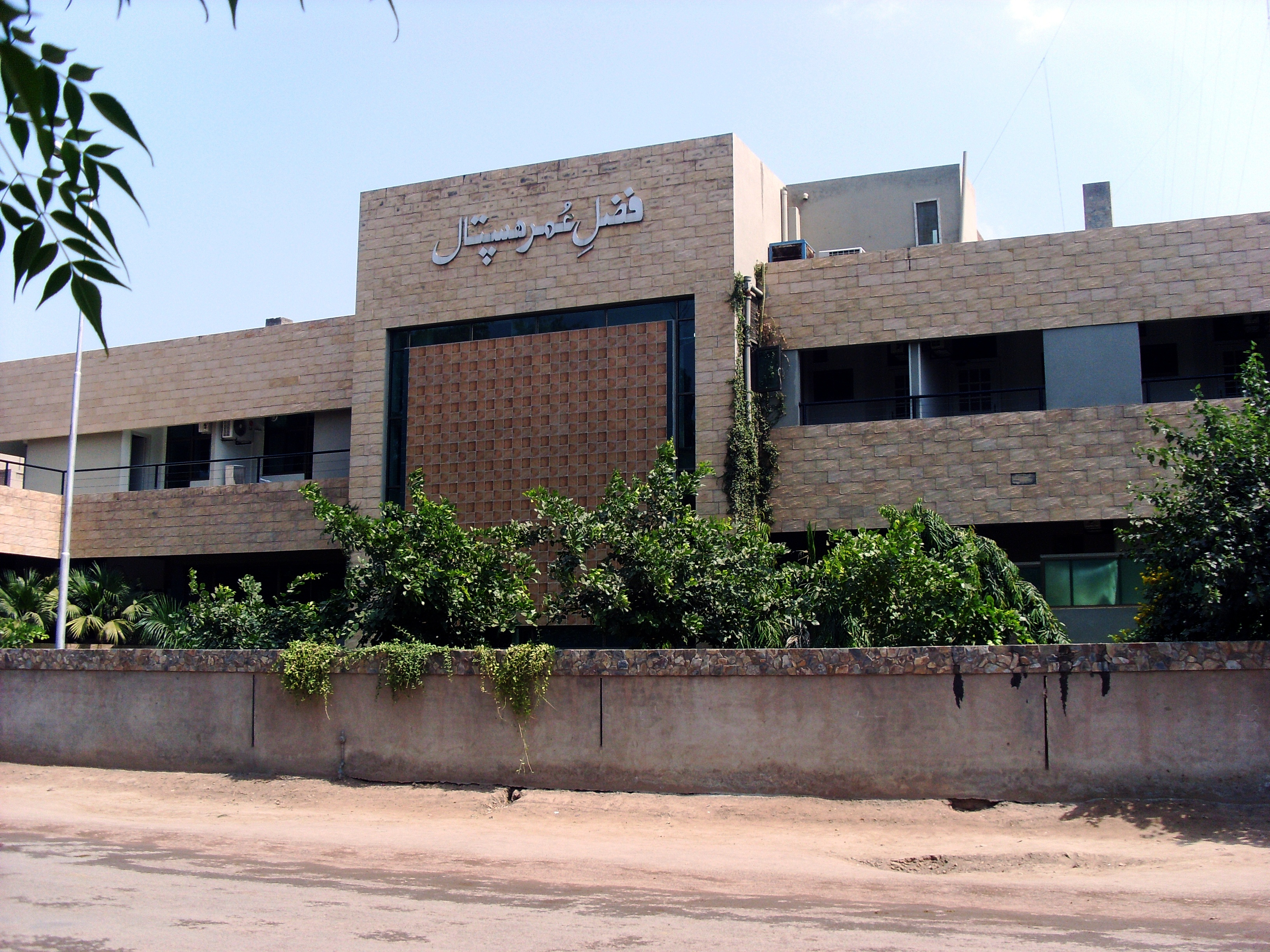 Fazl-e-Umar Hospital in Rabwah